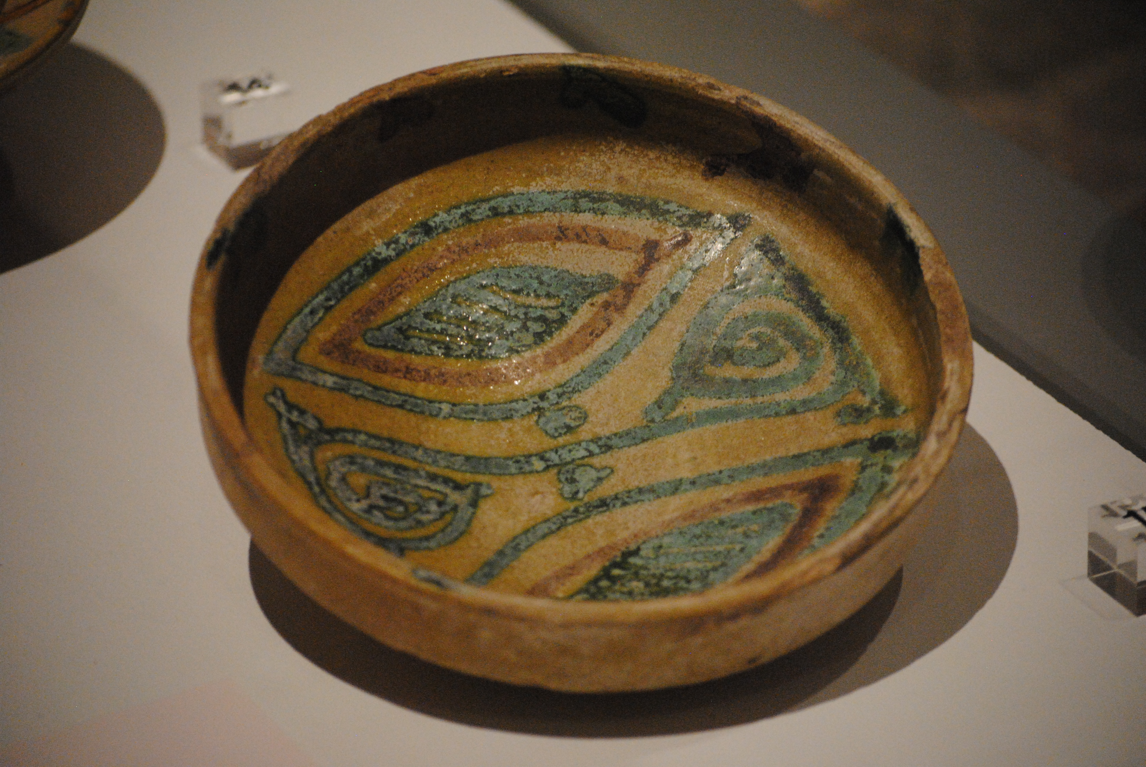 Catino invetriato policromo usato come bacino ceramico, importato dalla Sicilia islamica, risalente alla prima metà dell'XI secolo (chiesa di Santo Stefano extra moenia, Pisa) - Museo nazionale di San Matteo.